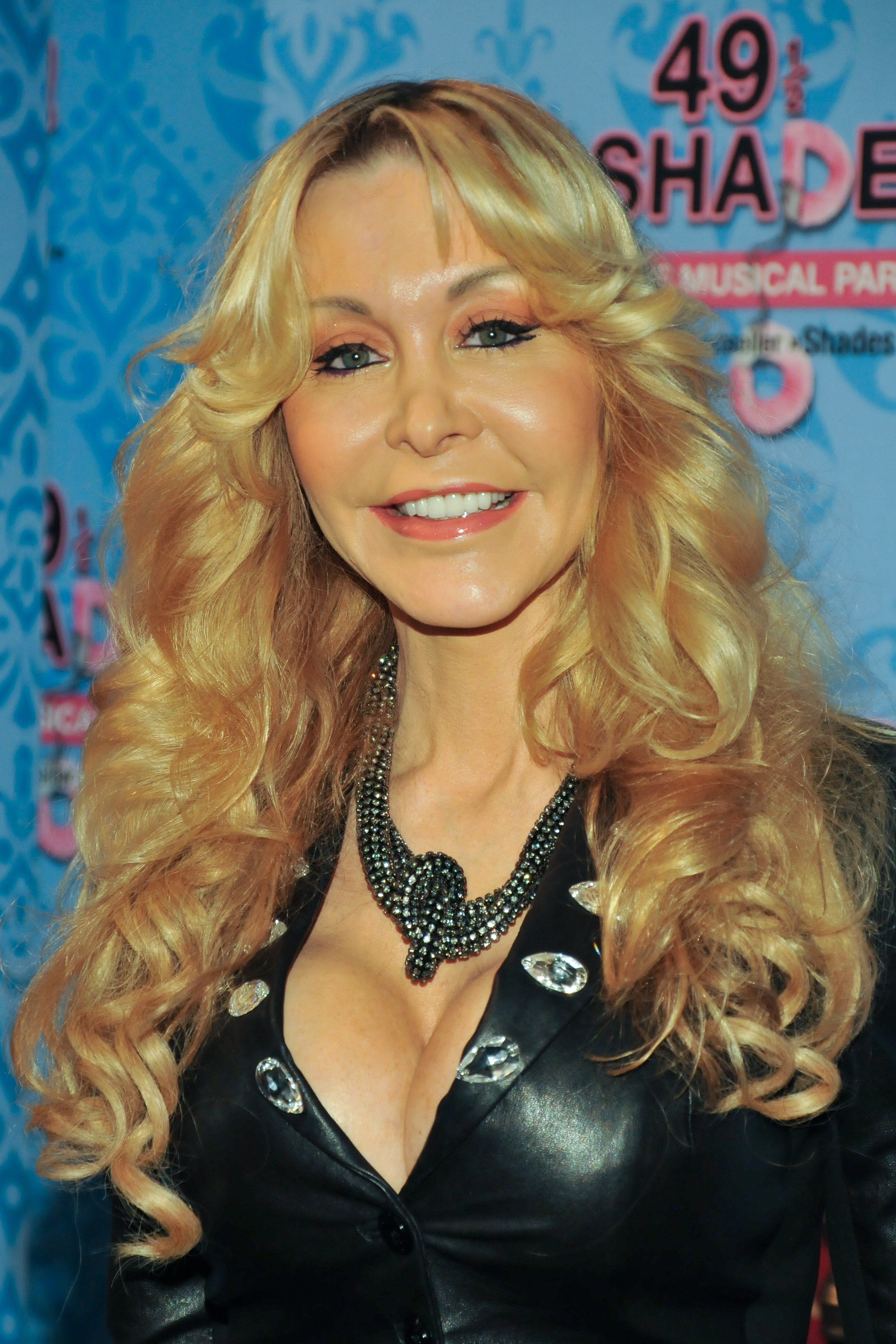 Dolly Buster auf der Premiere der Musical-Parodie "49 1/2 Shades" in Düsseldorf am 16. Februar 2014.